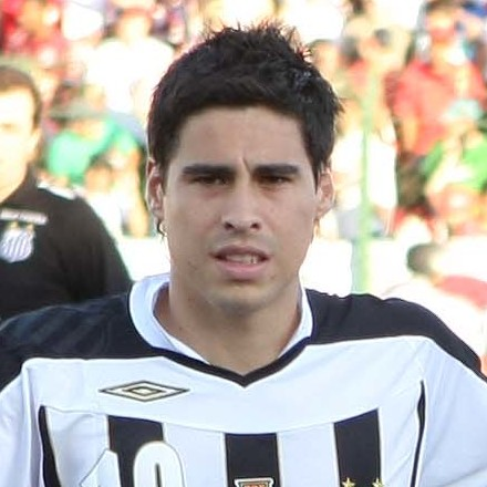 CAMPEONATO PAULISTA 2008 FUTEBOL ESPORTES SETÃOZINHO X SANTOS Time do Santos que iniciou a partida. - ESTÁDIO FREDERICO DALMAZO SERTÃOZINHO/SP BRASIL 01/03/2008 Foto: Junior Faria/GazetaPress código da foto